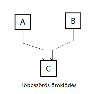 Többszörös öröklődés illusztrációja